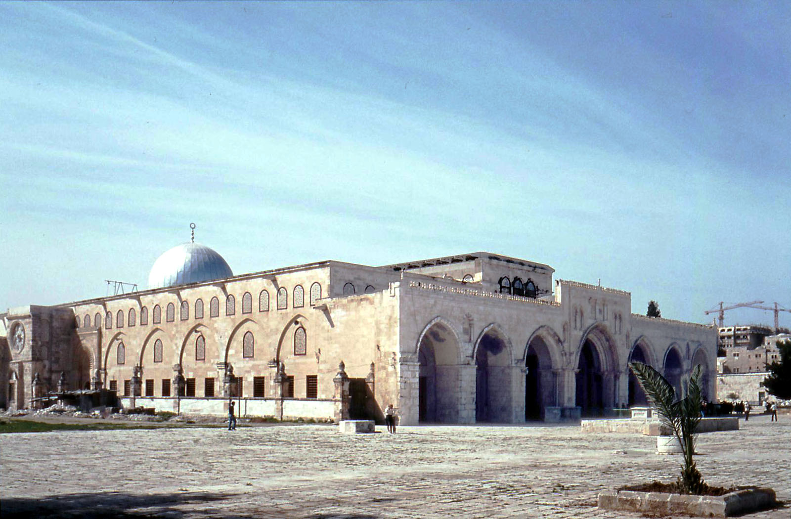 Al Jamea Al Qebli in Al Aqsa in Jerusalem